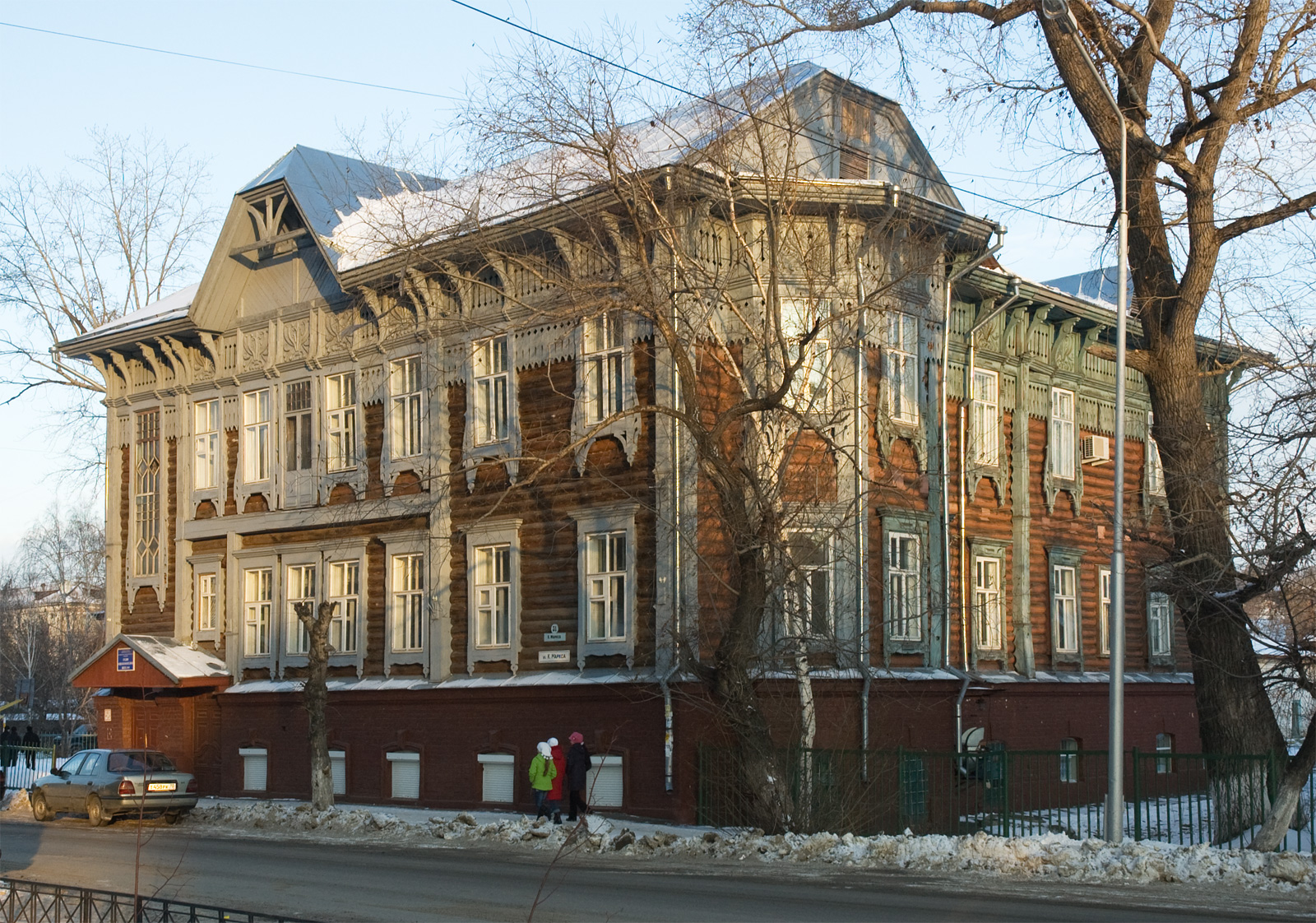 ул.Карла Маркса в Томске, д. 31